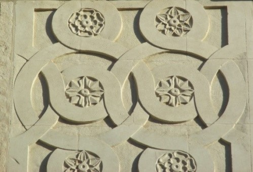 Blütenornamente am alten Rathaus in Luxemburg Stadt am Krautmarkt (Palais Grand-ducal)